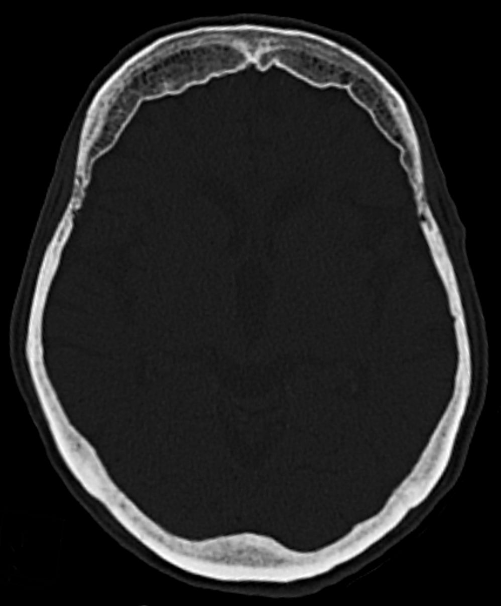 Hyperostosis frontalis interna bei einer 83-jährigen Frau in der Computertomographie. Man erkennt gut die Ausbreitung nach innen.